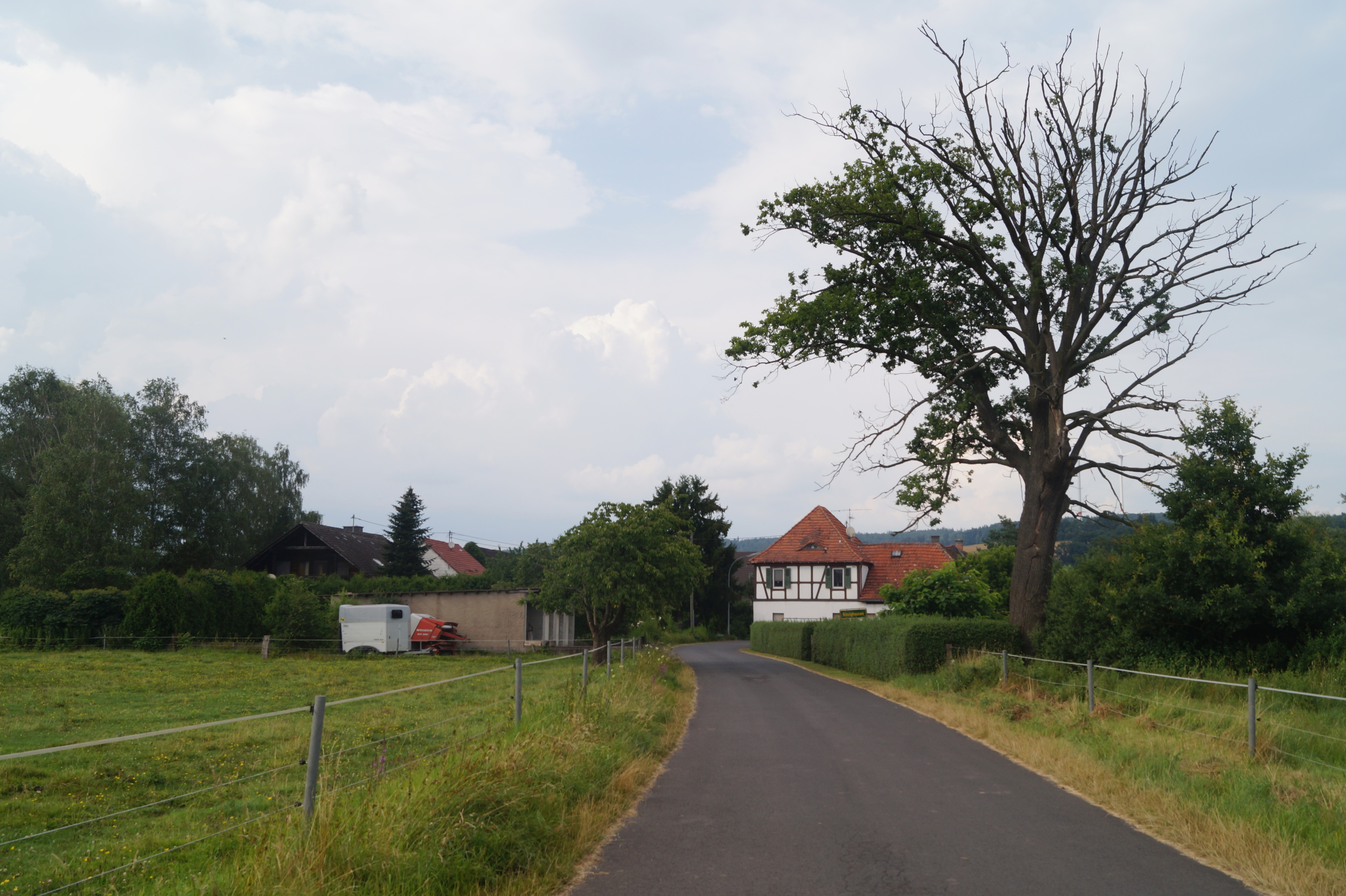 Hof Kinzighausen bei Wächtersbach, MKK, Hessen, Ansicht von Süden